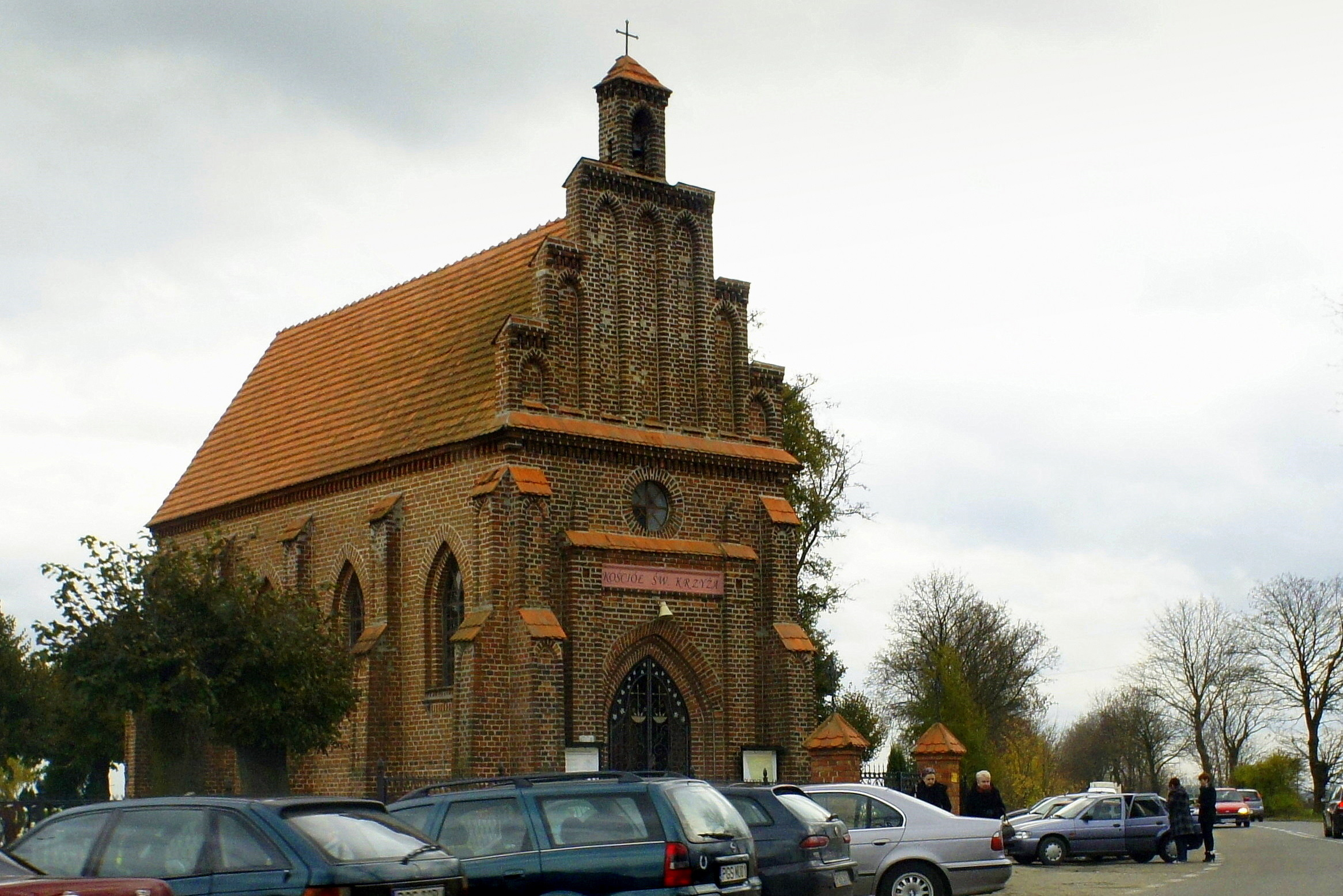 Borek Wielkopolski, powiat gostyński. Kościół p.w. Św. Krzyża